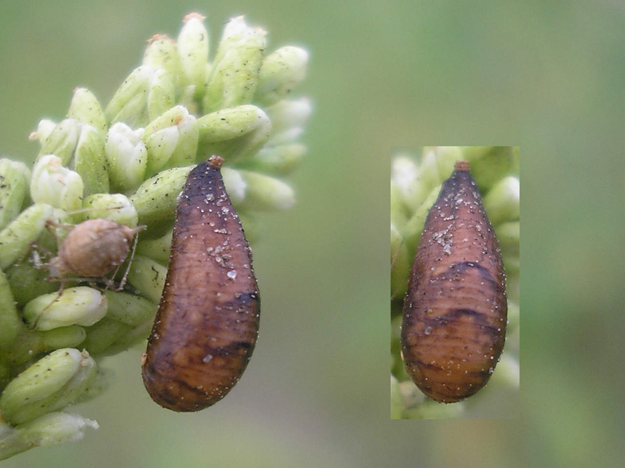 Pupa of a hoverfly (Syrphidae). This very specimen was made by a larva invested with a ichneumon wasp (Ichneumonidae) of genus Diplazon, that later came out of the pupa instead of the hoverfly. Location: Hengelo (Overijssel), Netherlands Keywords: Pupa, Pupae, Syrphidae, Flowerfly, Flower-fly, Ichneumonidae, parasite --- nl: Pop van een zweefvlieg (Syrphidae). Uit deze pop kroop later geen zweefvlieg, maar een sluipwesp (Ichneumonidae) van het geslacht Diplazon die als eitje in de zweefvlieglarve was gelegd en op larve en pop had geparisteerd. Locatie: Hengelo (Overijssel), Nederland Trefwoorden: Verpoppen, parasiet --- de: Puppe einer Schwebfliege. Aus diesem exemplar kam dennoch eine Schlupfwespe hervor des Genus Diplazon die wohl als Ei in der Schwebfliegenlarve eingebracht war.